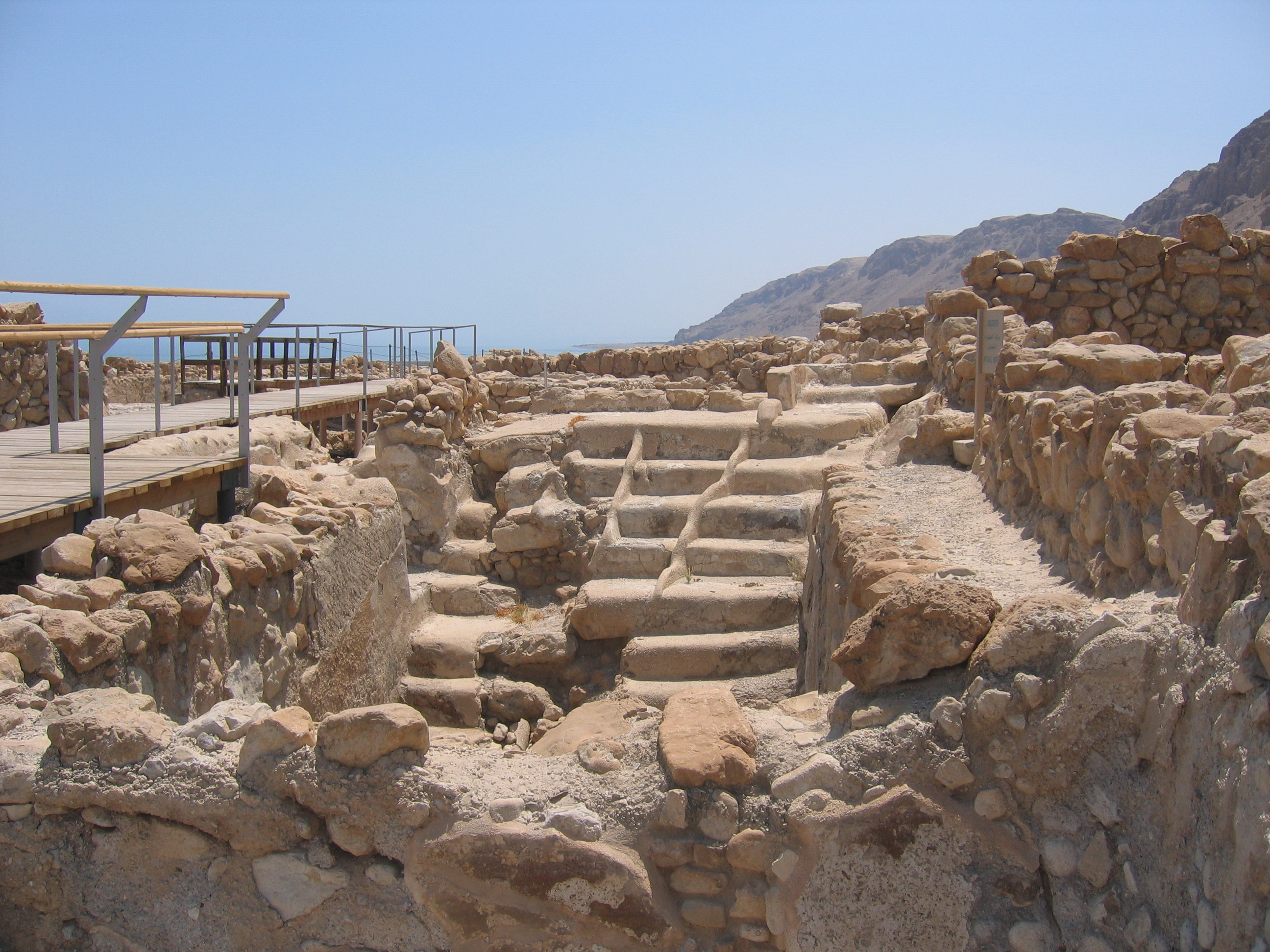 Qumran miqveh est (locus 48)